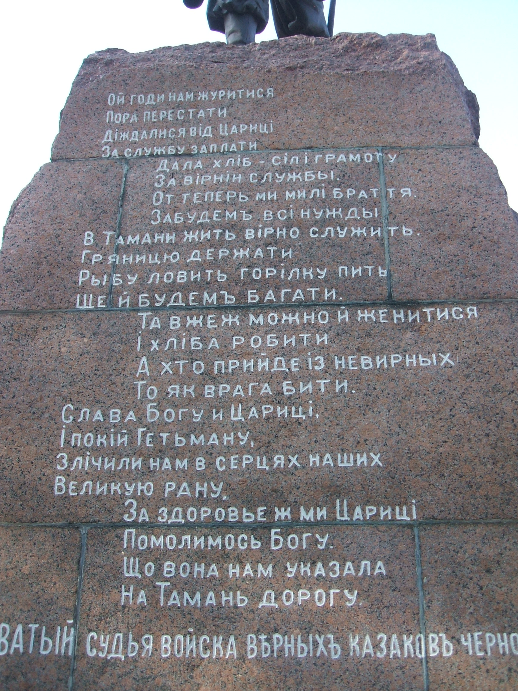 Стихи на памятнике таманскому казачеству